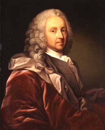 Portrait of Ludvig Holberg (1684-1754)